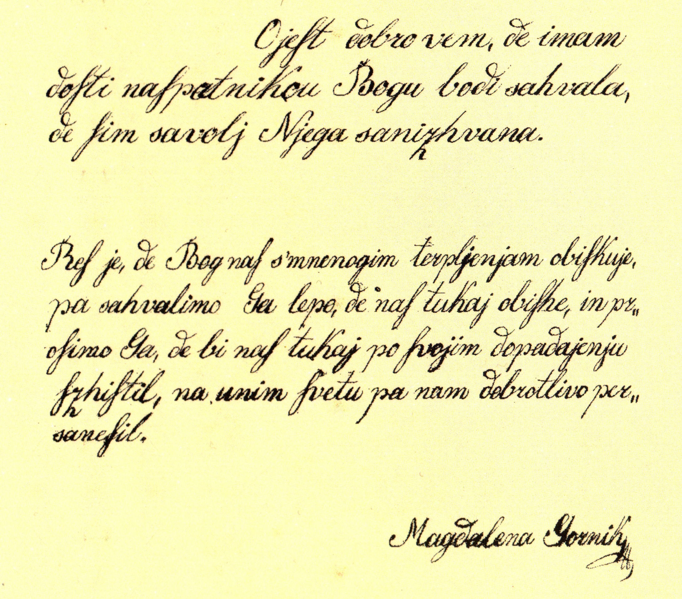 letter of Magdalena Gornik